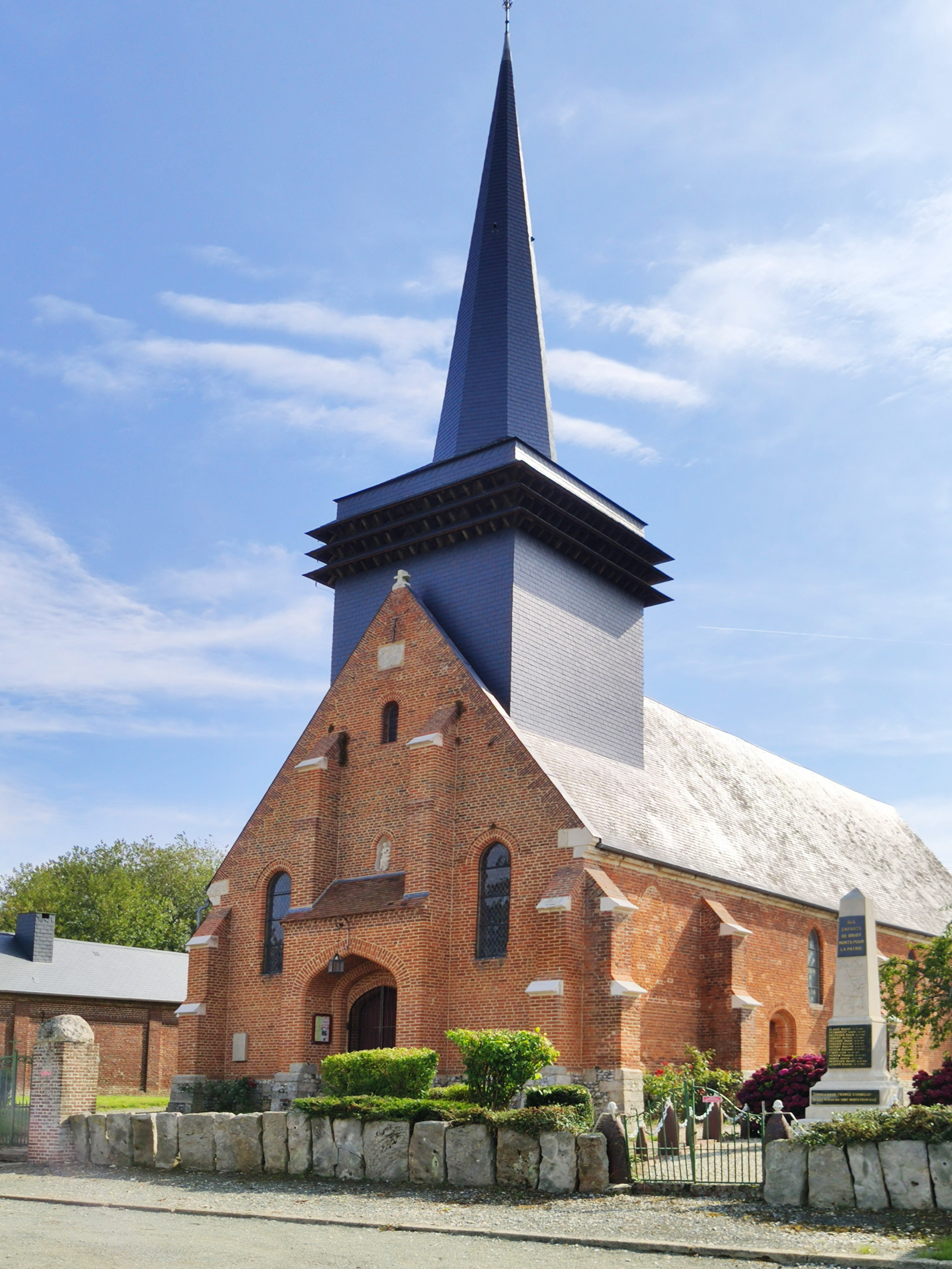 Briot : église Saint-Matthieu